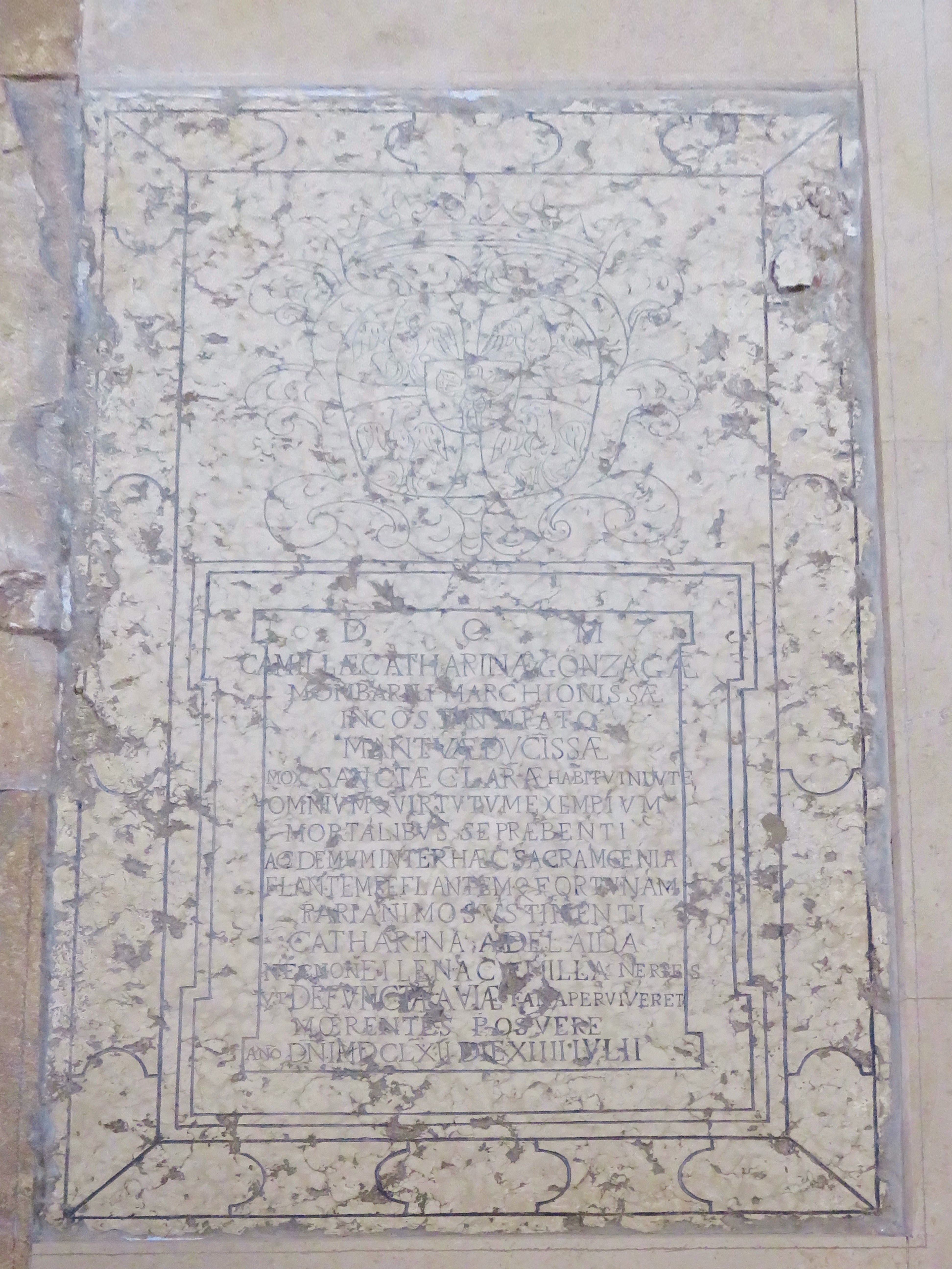 Tombe casata degli Estensi - Camilla Caterina Gonzaga o Camilla Faà di Bruno